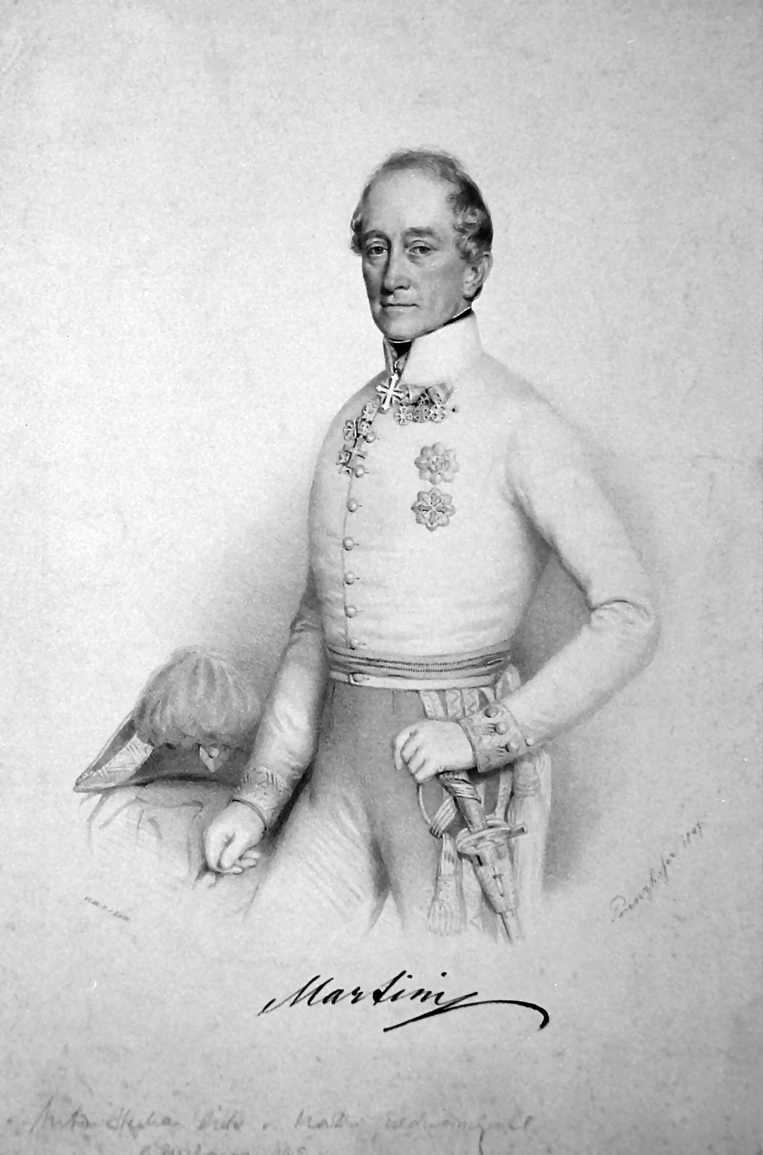 Anton Stephan Freiherr von Martini (1792-1861), Diplomat, k. k. Feldzeugmeister, Vice-Admiral, Direktor der Wiener Neustädter Militärakademie, Generalstabsoffizier. Lithographie von August Prinzhofer, 1847